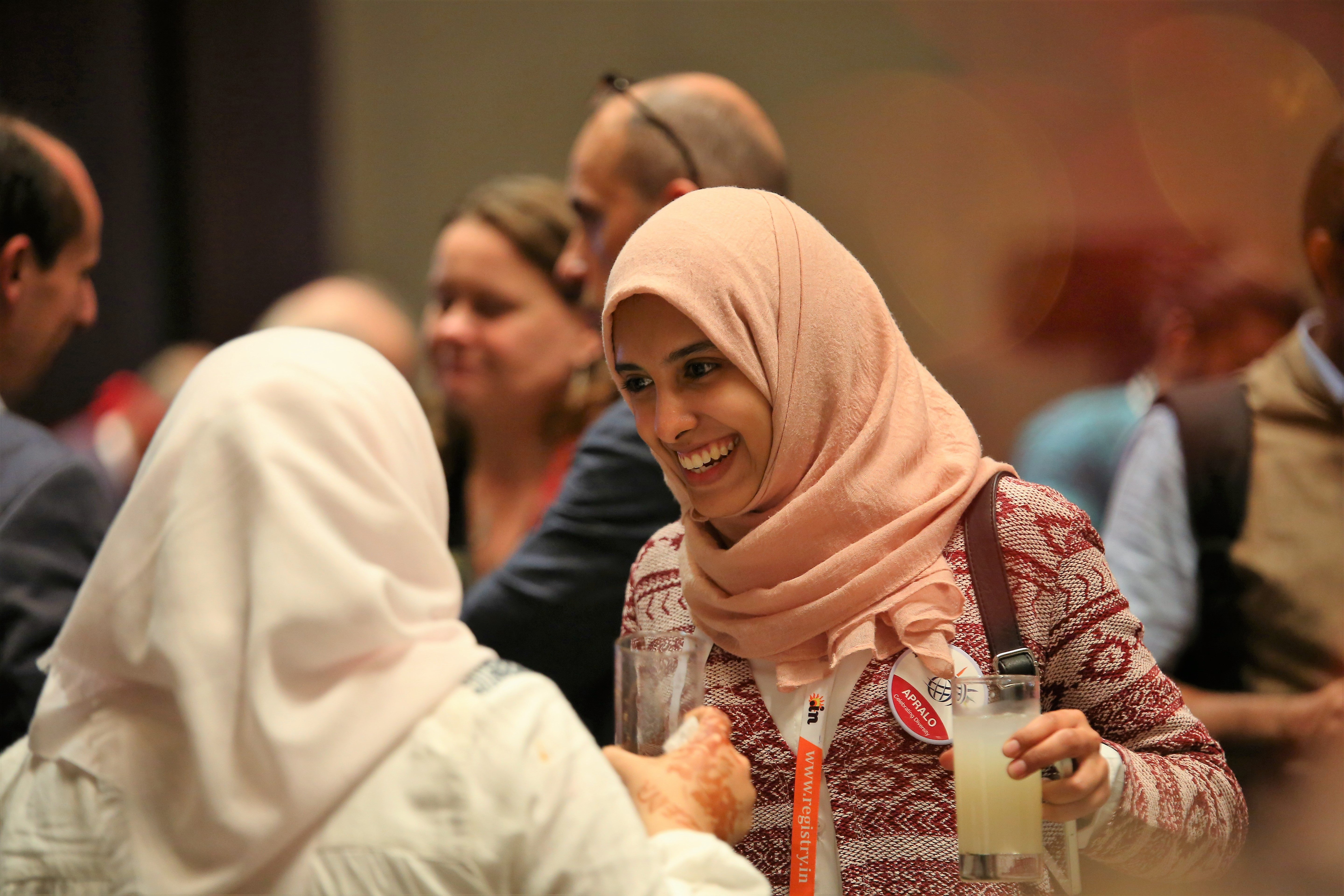 MYRF9420